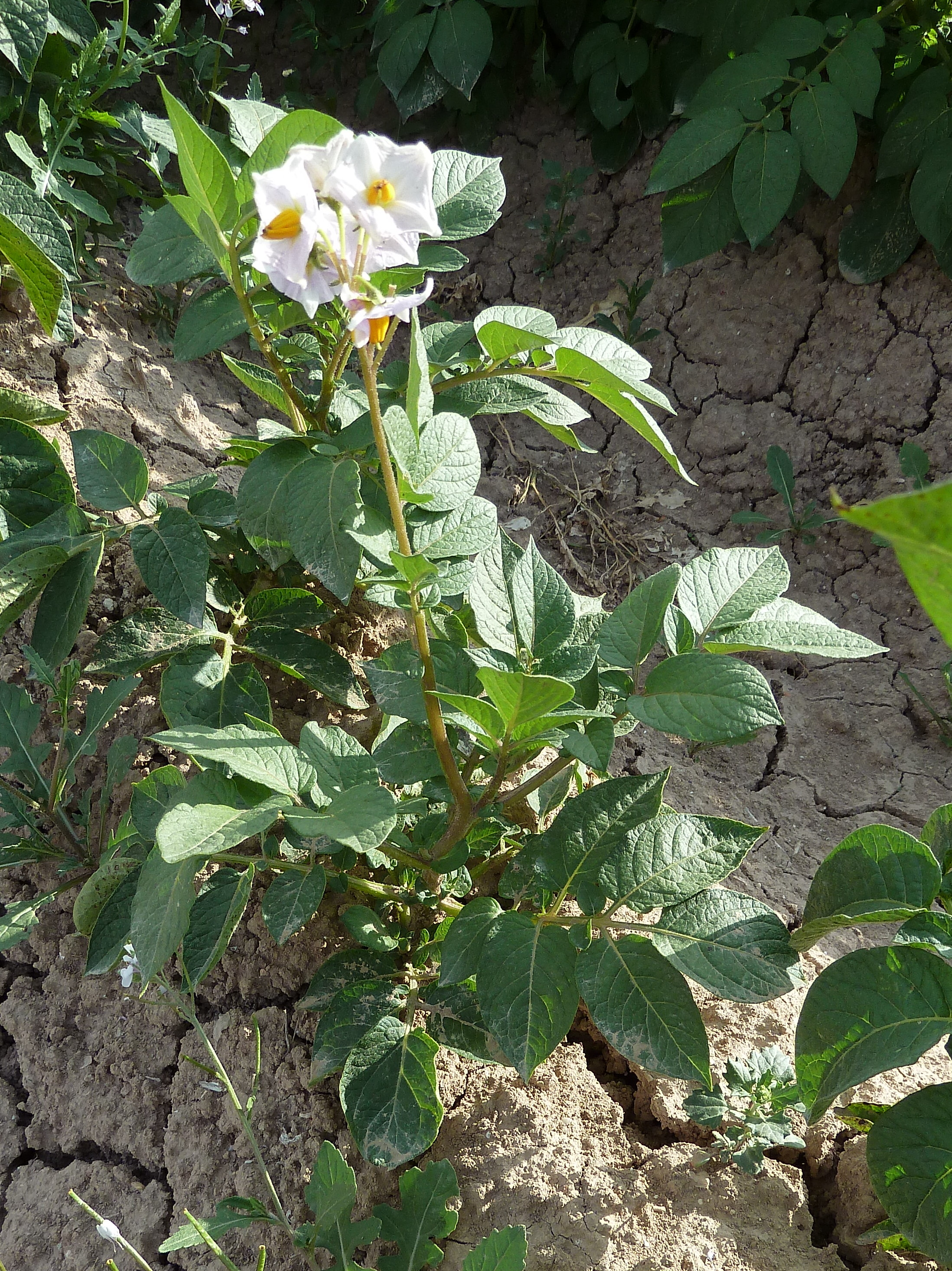 Solanum tuberosum (Patata) : Aspecto general en flor - Camino de San Isidro, Albatera (Alicante, España).